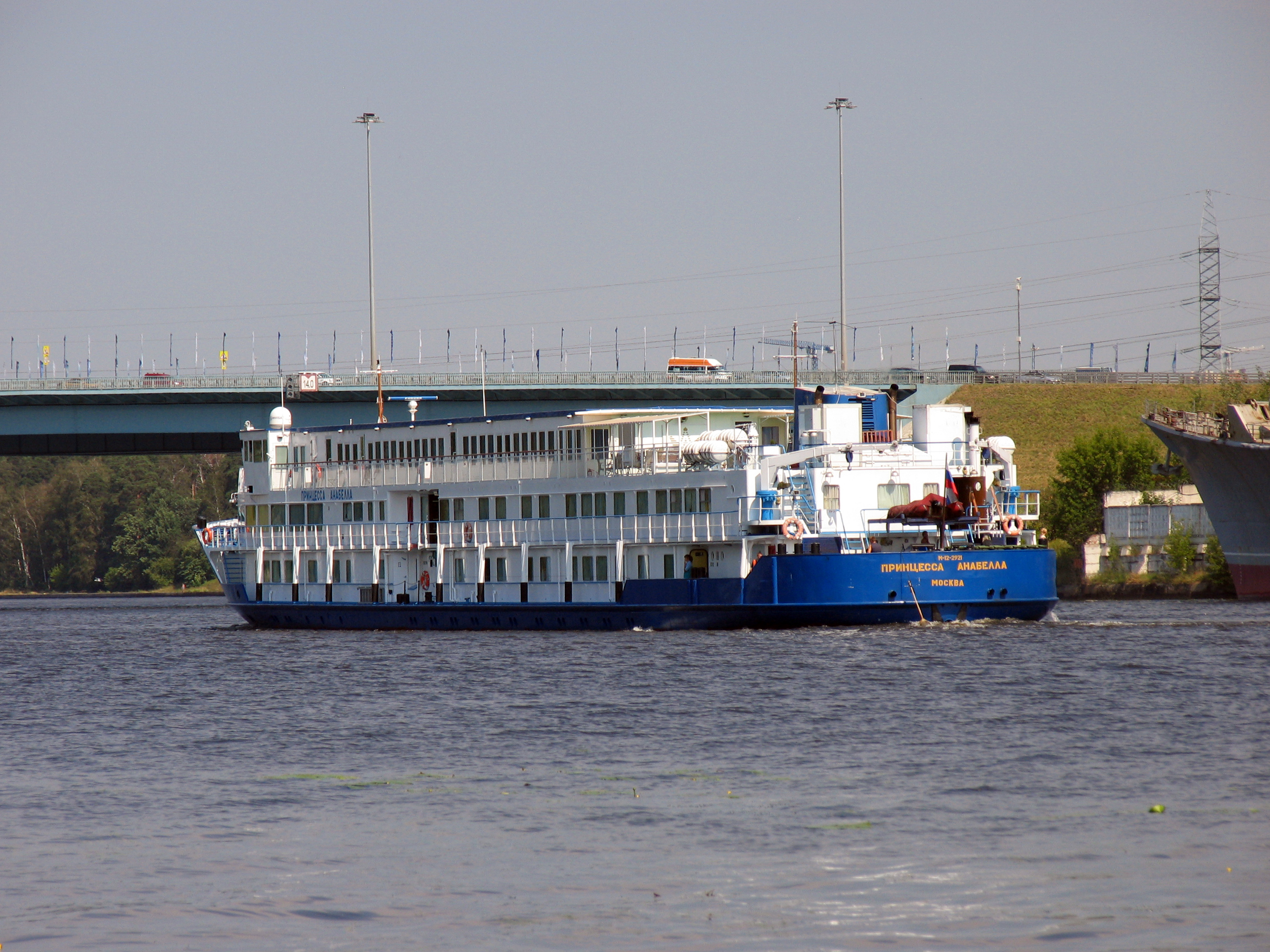 Теплоход "Принцесса Анабелла" на Химкинском водохранилище.